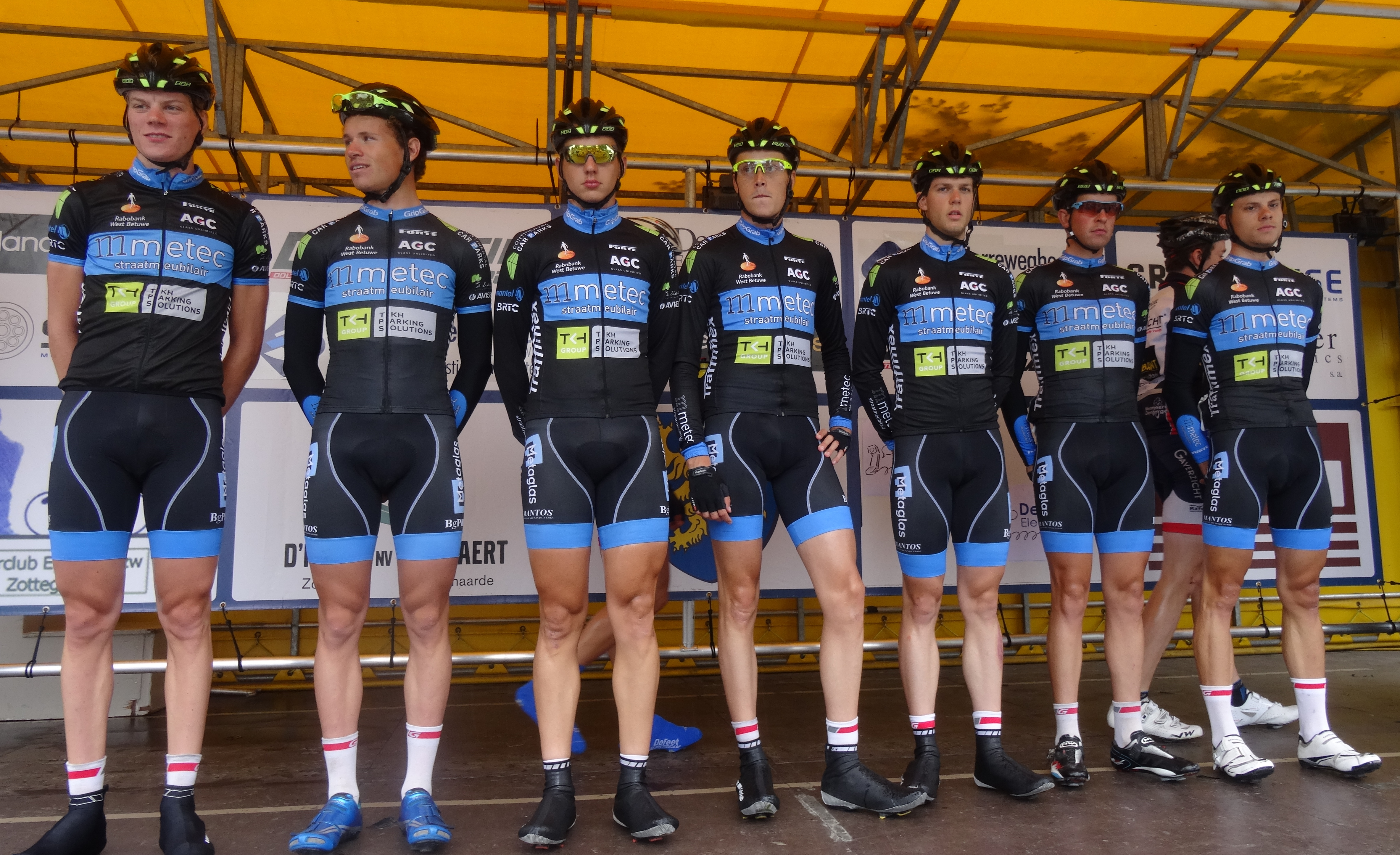 Reportage photographique réalisé le samedi 5 juillet à l'occasion du départ et de l'arrivée du Circuit Het Nieuwsblad espoirs 2014 à Grotenberge (Zottegem), Belgique.